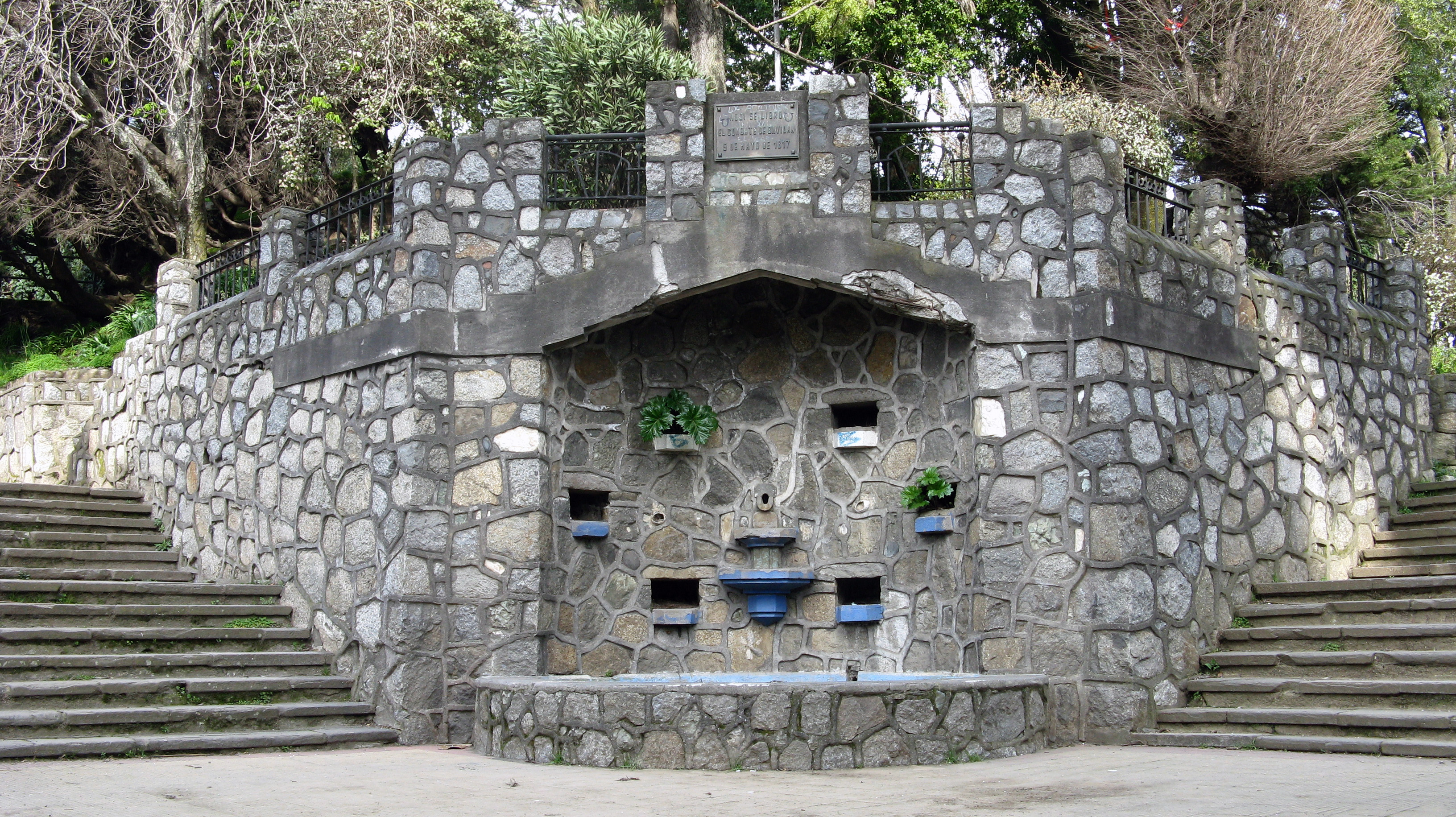 Entrada del Cerro Amarillo Concepción, Chile Agosto de 2012